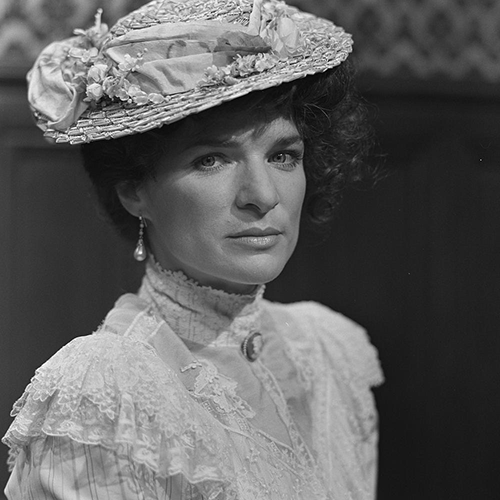 Linda van Dyck als Eva in de Nederlandse dramaserie Noodlot in 1981